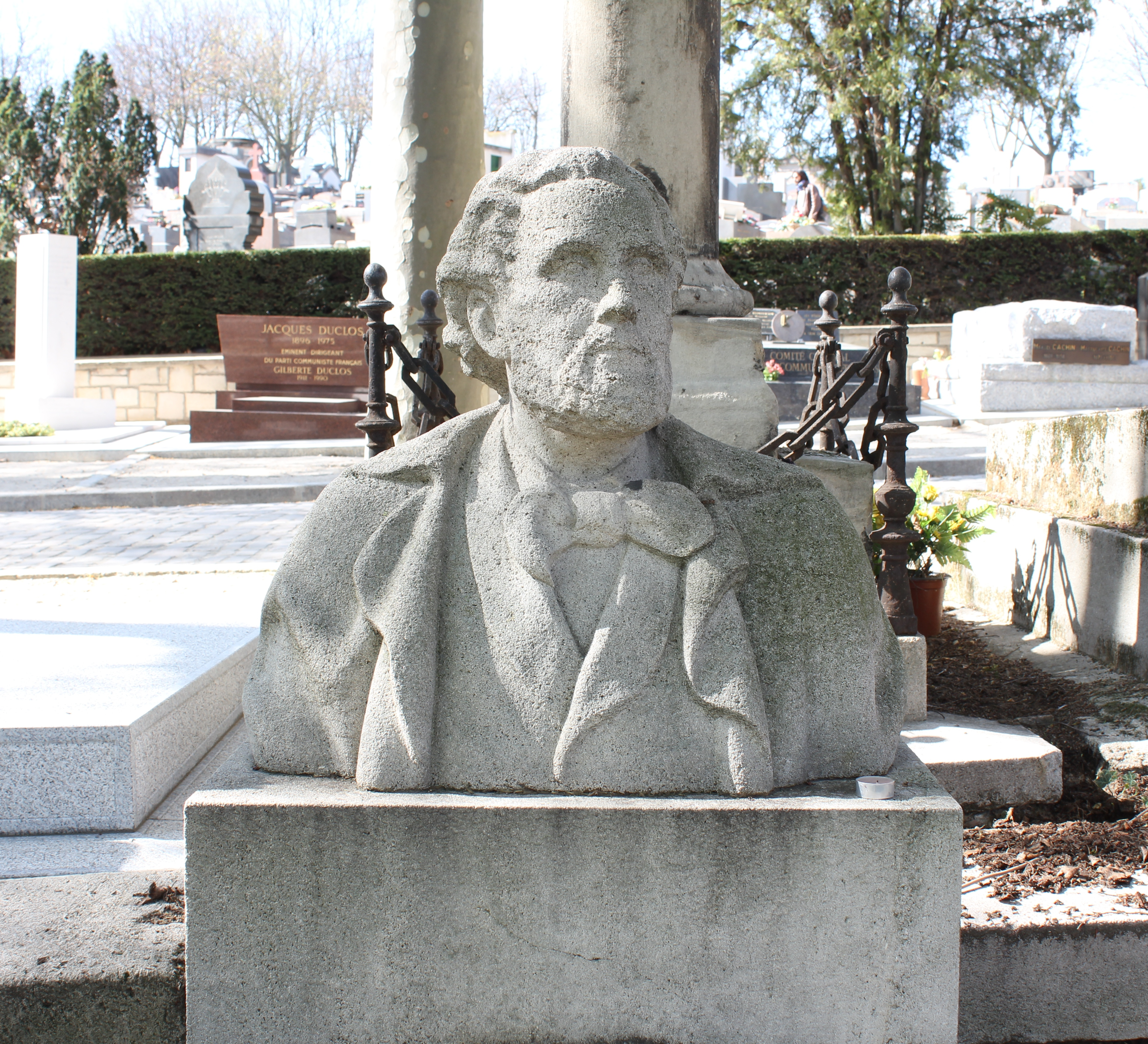 Tombe ornée d'un buste en pierrebuste